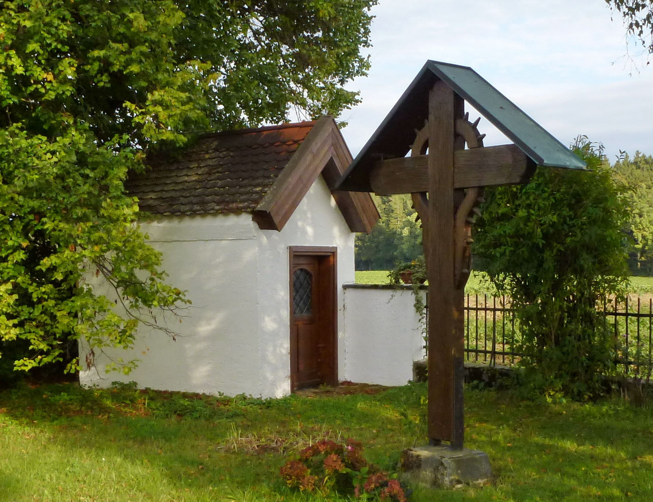 Hofkapelle St. Georg, Ansicht von Nord-West. Die Statue des Hl. Georg und mindestens eine weitere wurden bereits vor vielen Jahren entwendet, danach blieb einige Zeit noch die Statue des Hl. Joachim in der Kapelle, bis diese schließlich vom Besitzer selbst entfernt wurde (Auskunft der Eigentümerin). Inzwischen wurde eine neue Georgs-Statue (in Anlehnung an den Hl.Georg in der Hoflacher Kirche) gefertigt, die demnächst geweiht und dann wieder in die Kapelle gestellt werden soll.This is a photograph of an architectural monument.